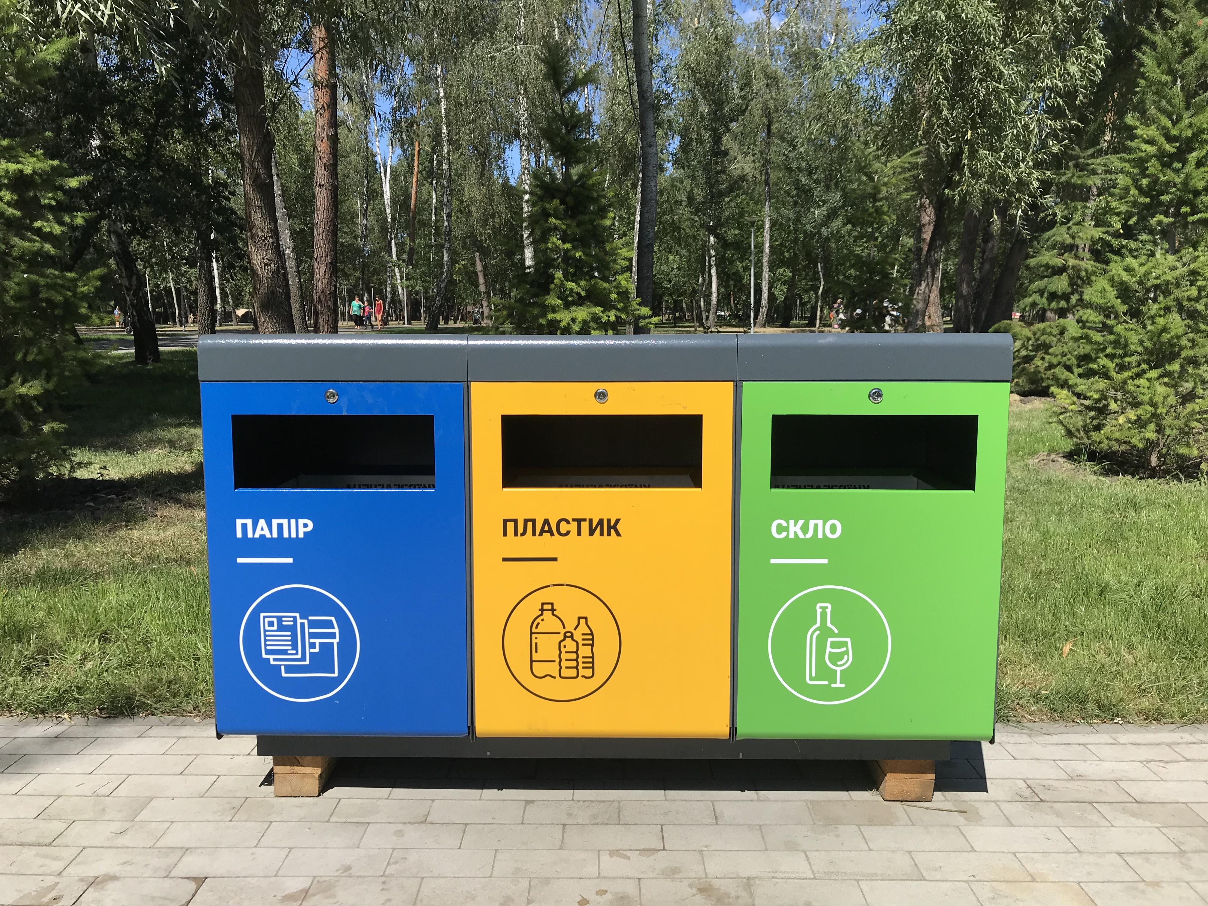 Контейнеры для разделения мусора в парке «Победа» в Киеве